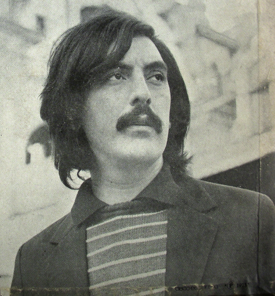 Fotografía de portada del álbum "Pelusa" del músico uruguayo José Carbajal "El Sabalero" editado en Argentina en 1973 bajo el sello Microfón serie I-401.